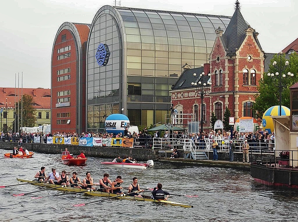 Osada uniwersytetu Oxford podczas wyścigu "Wielka Wioślarska" w Bydgoszczy